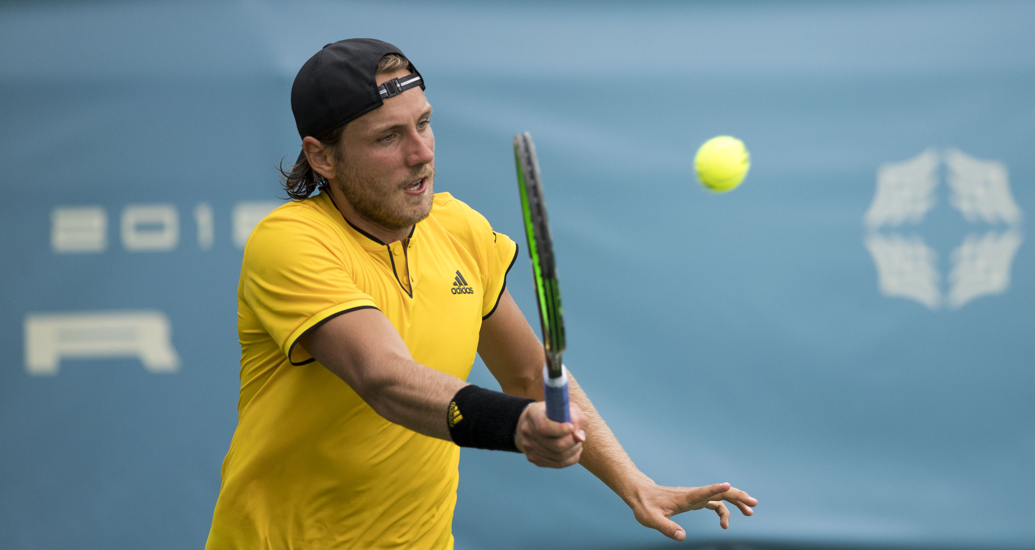 Citi Open Tennis 2017